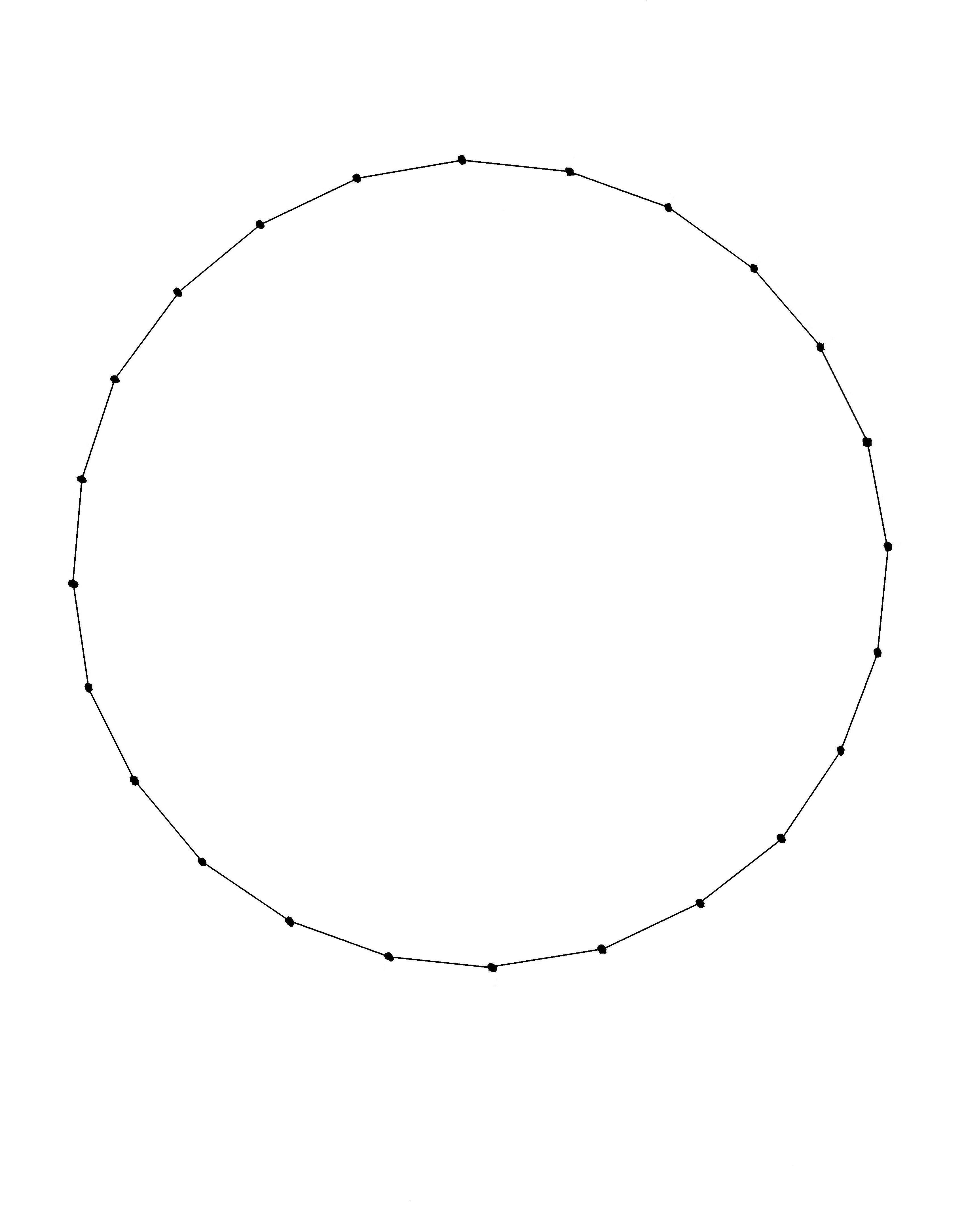 Polygone à 24 côtés